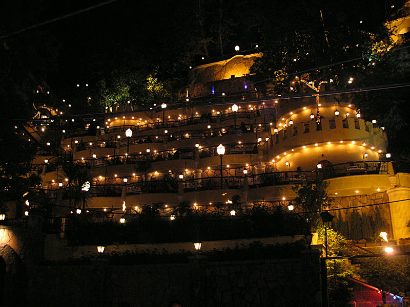 Darband